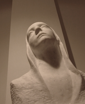 Srpski (latinica): Vladislava Krstić, autoportret, mermer